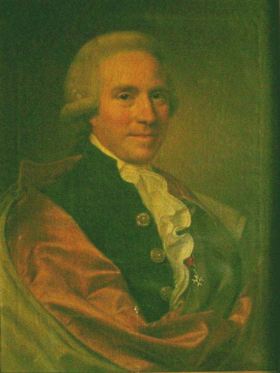 ritratto dell'Architetto Andrea Vici in veste di Principe della Romana Accademia di San Luca